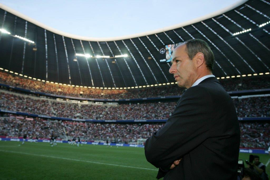 Trainer Rainer Maurer Eröffnungsspiel Allianz Arena Derby FC Bayern München - TSV 1860 München